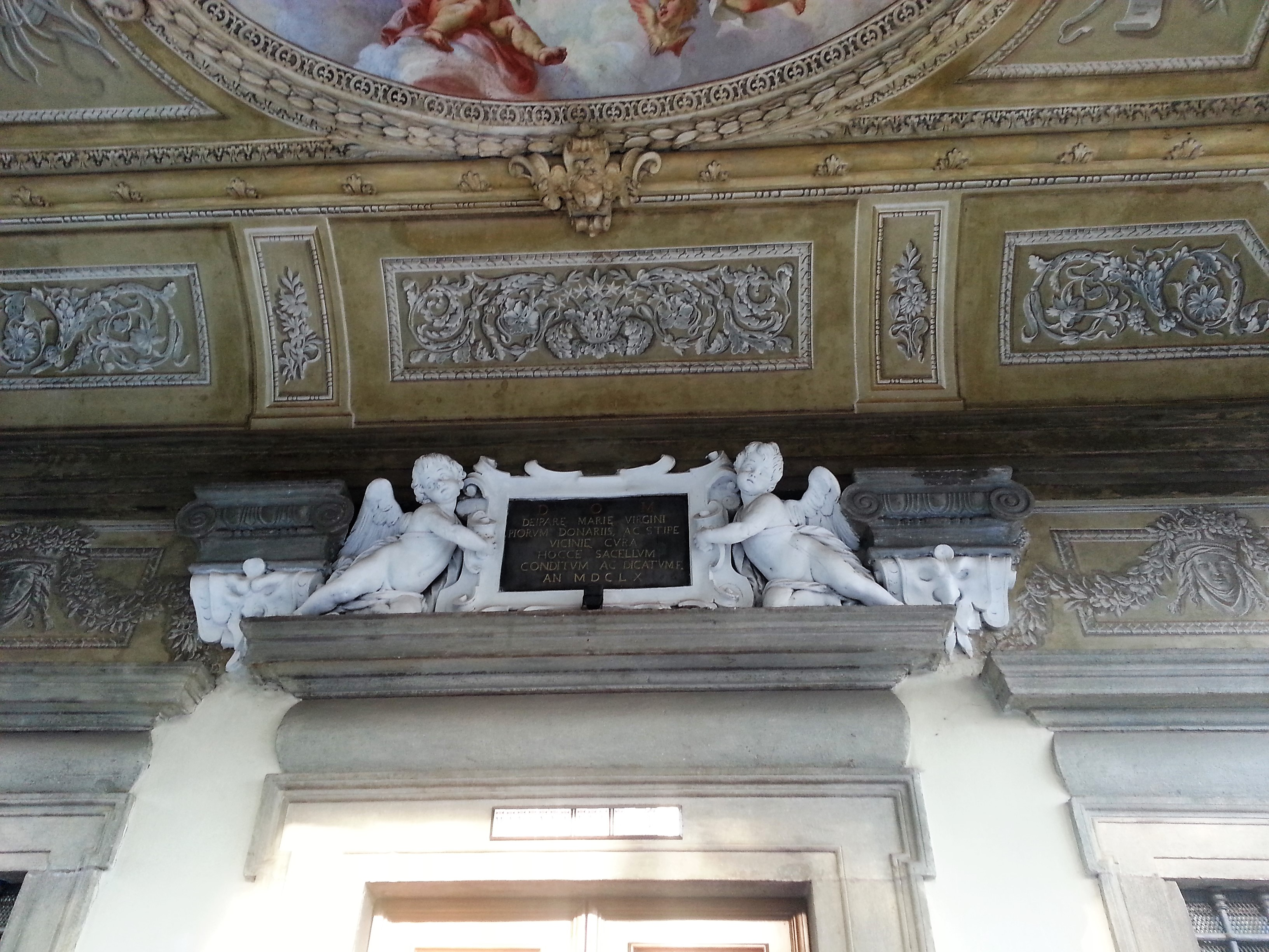 Esterno della chiesa della Madonna del Giglio . cartiglio